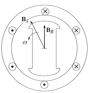 Kahepooluseline sünkroonmootor